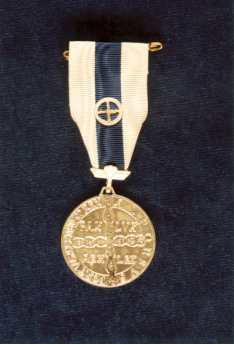 Medalha de D. Afonso Henriques 2ª Classe